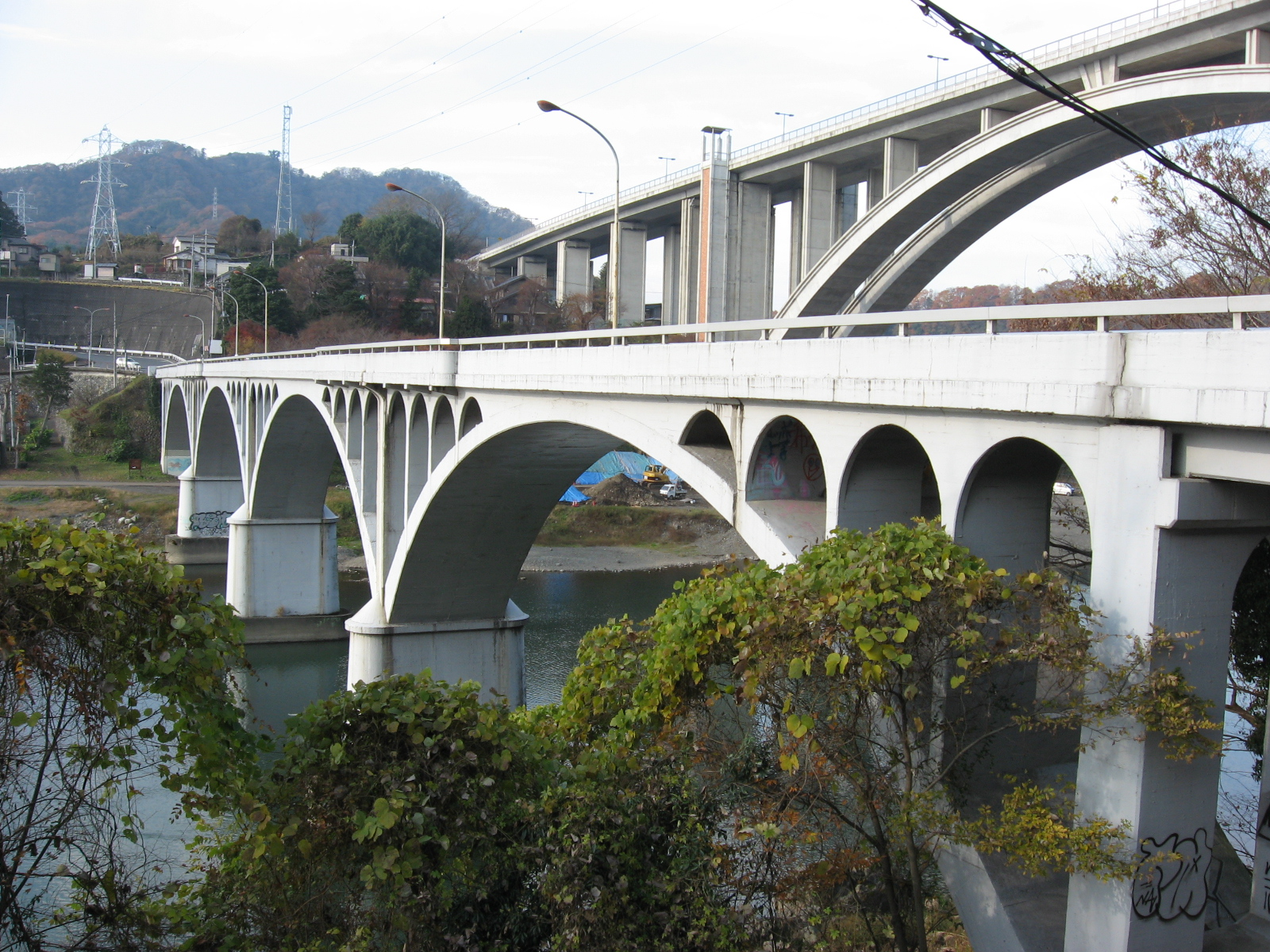 相模川に架かる小倉橋